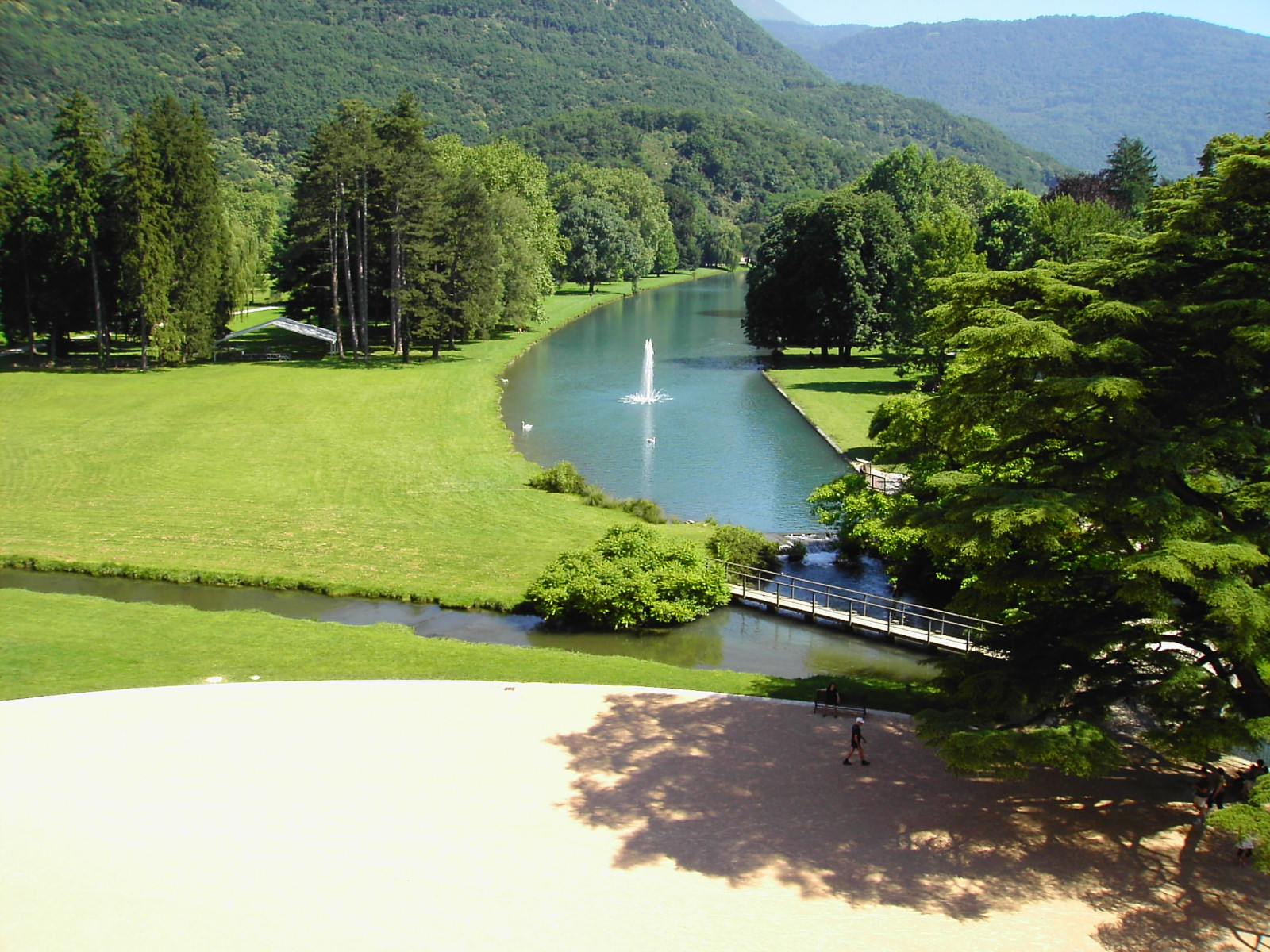 Parc du Château de Vizille, Isère, France